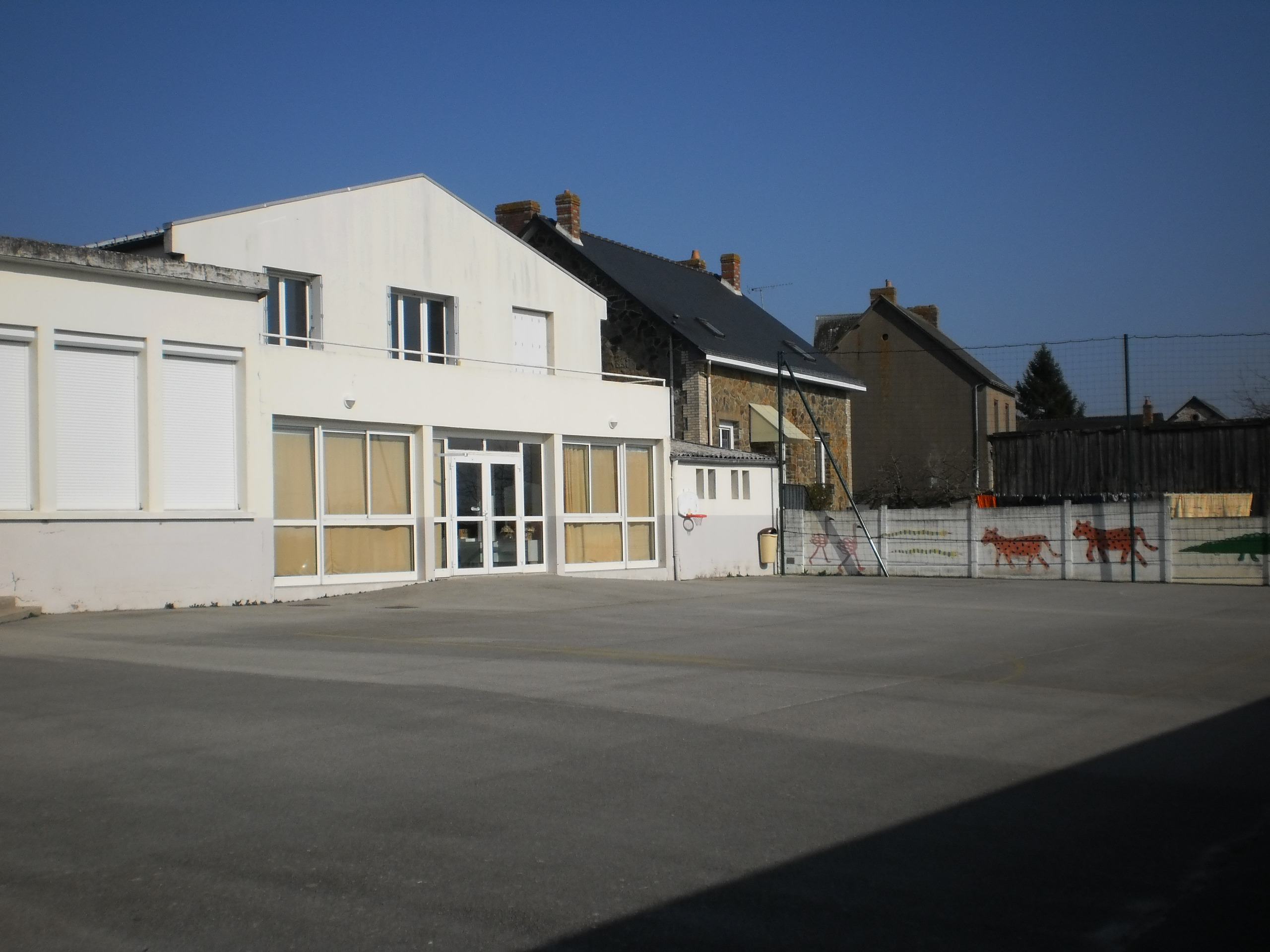 Ruffigné (Loire-Atlantique, France) - école